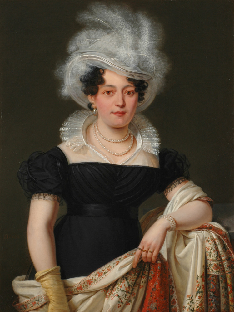 Ritratto di signora, olio su tela, collezione privata